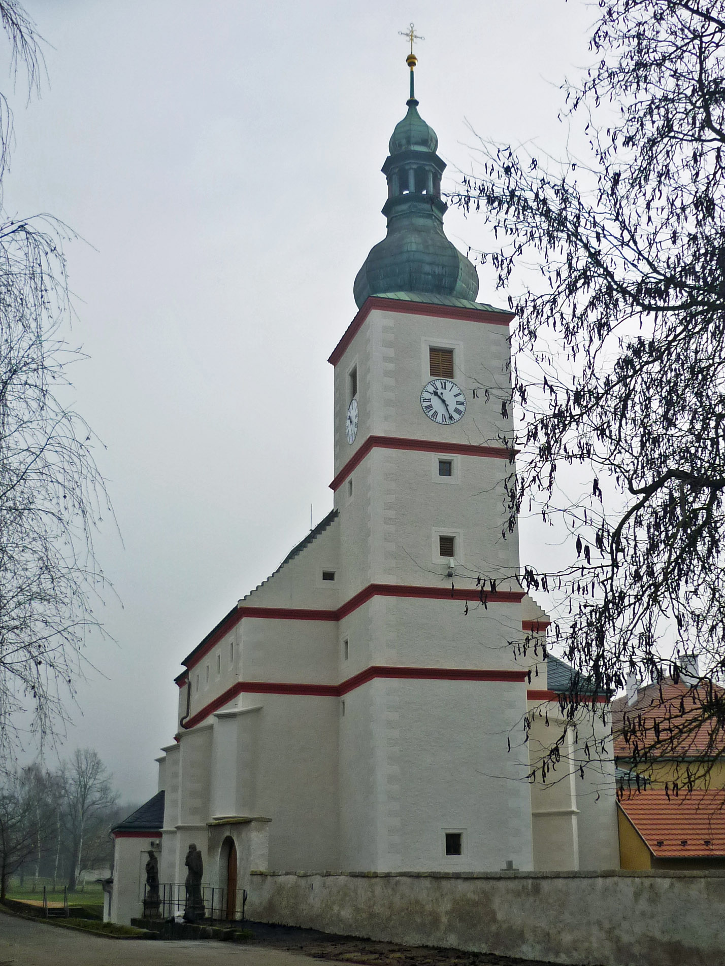 Kirche St. Florian in Schönpriesen (Krásné Březno)